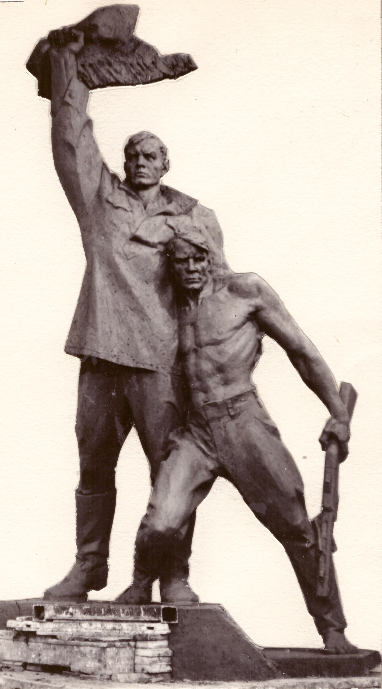 Пам’ятник загиблим воїнам-односельчанам в роки Великої Вітчизняної війни 1941-1945 р.р. С. Пекарщина Черняхівський район Житомирська область. 1972. Скульптор Таранченко В.О., архітектор Грінченко В.Ф. Литий бетон.